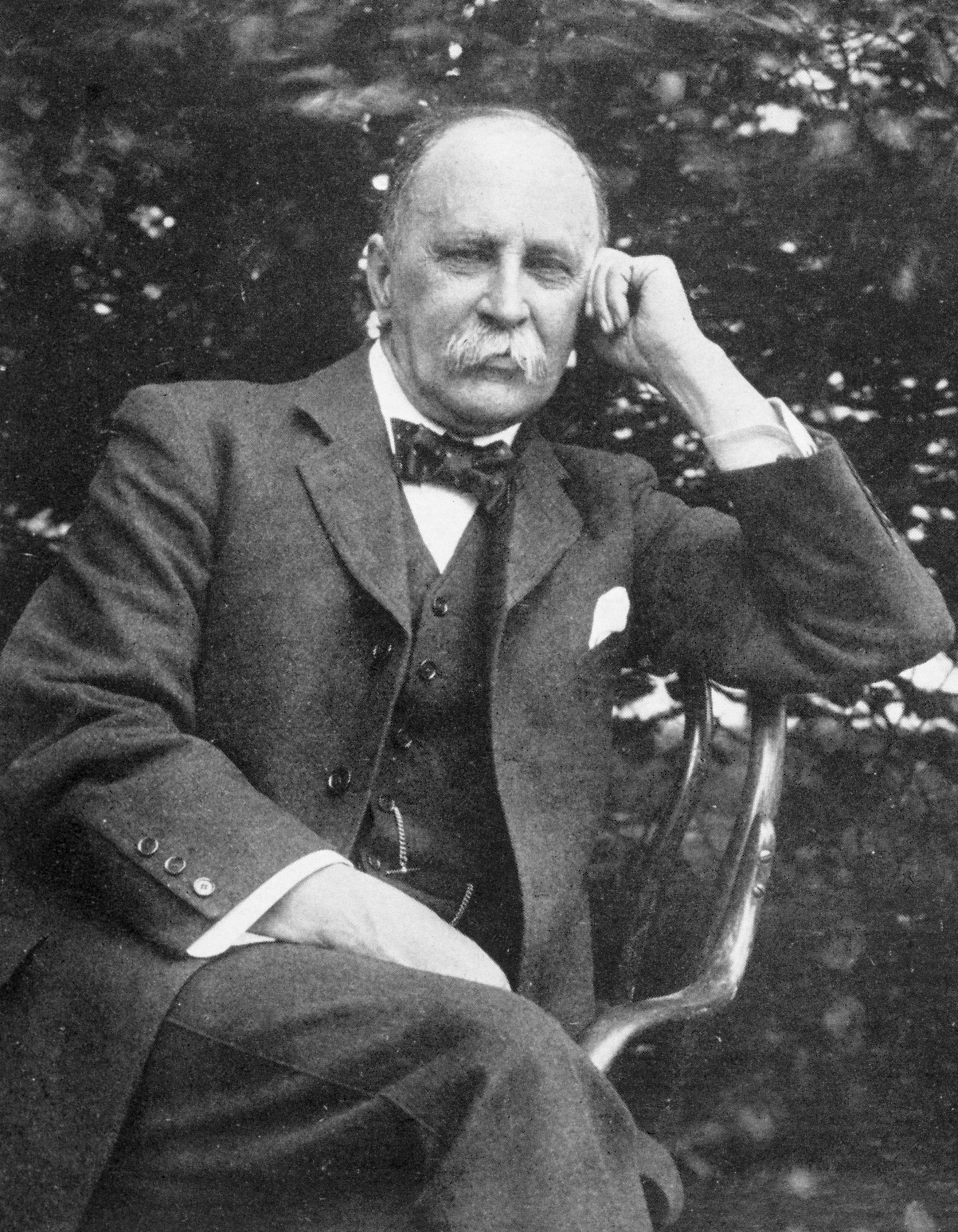 William Osler